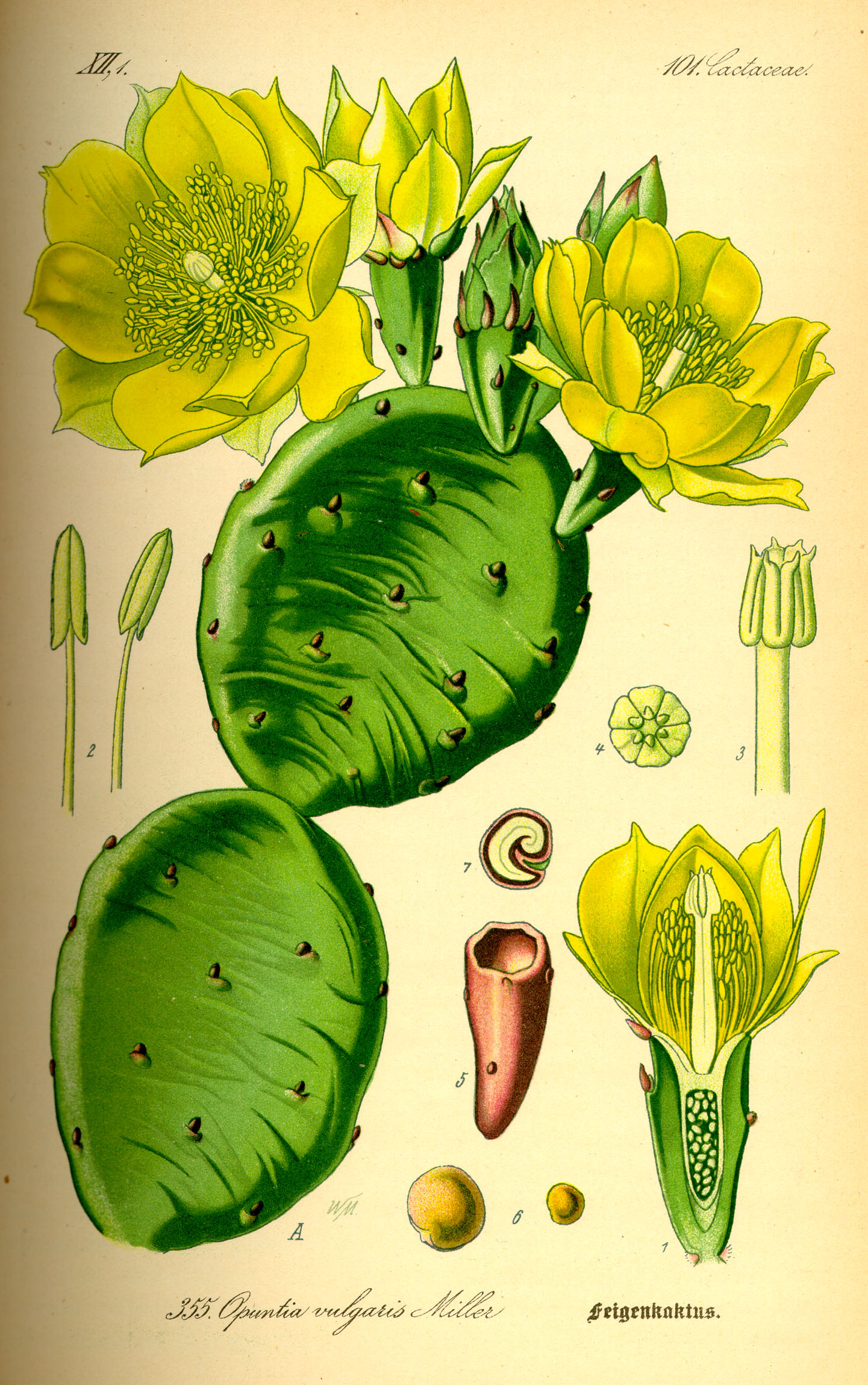 Opuntia vulgaris from Flora von Deutschland Österreich und der Schweiz, Gera 1885